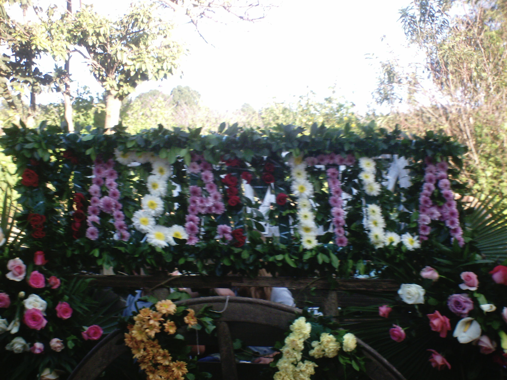 mazamitla flowers